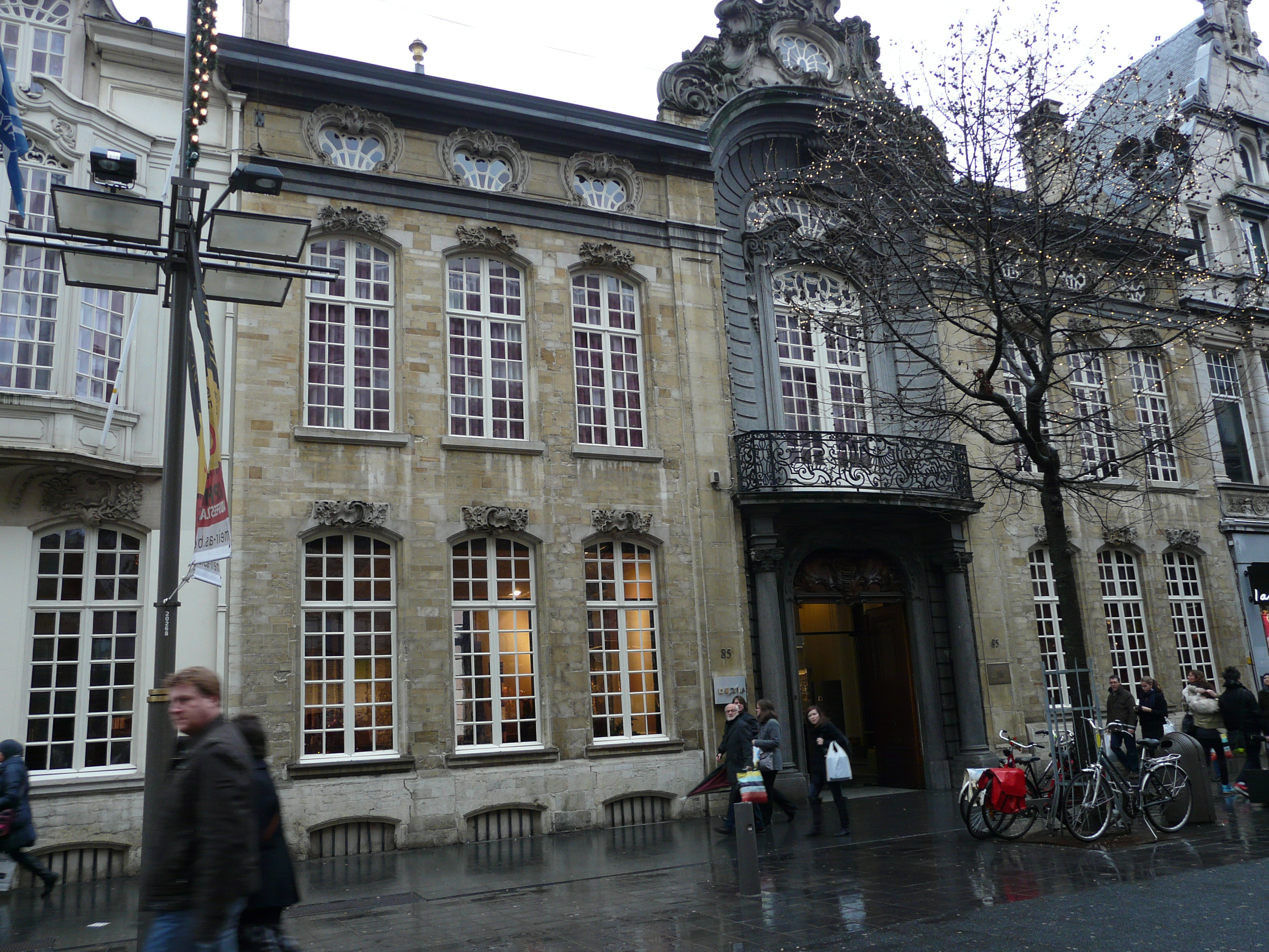 Hôtel van Susteren-du Bois, heden bekend als Huis Osterrieth aan de Meir 85 in Antwerpen. Rococo-herenhuis naar ontwerp van Jan Peter van Baurscheit, die hiervoor opdracht ontving in 1749.